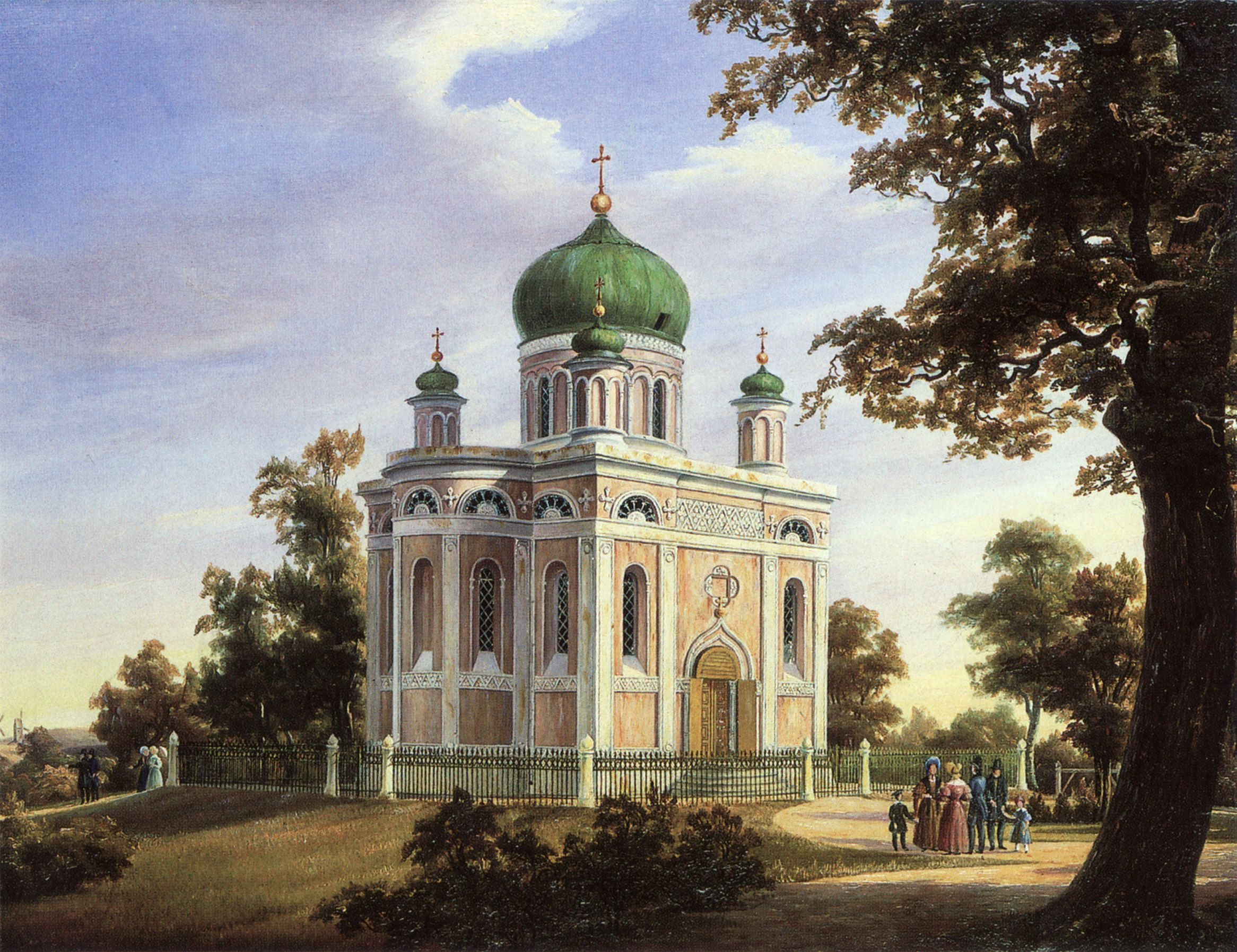 Potsdam - Alexander-Newski-Gedächtniskirche. Gemälde von Carl Daniel FreydanckDie Griechische Kirche bei Potsdam, 1838, Öl auf Leinwand, 27,2 x 35,1 cm, SPSG - KPM-Archiv